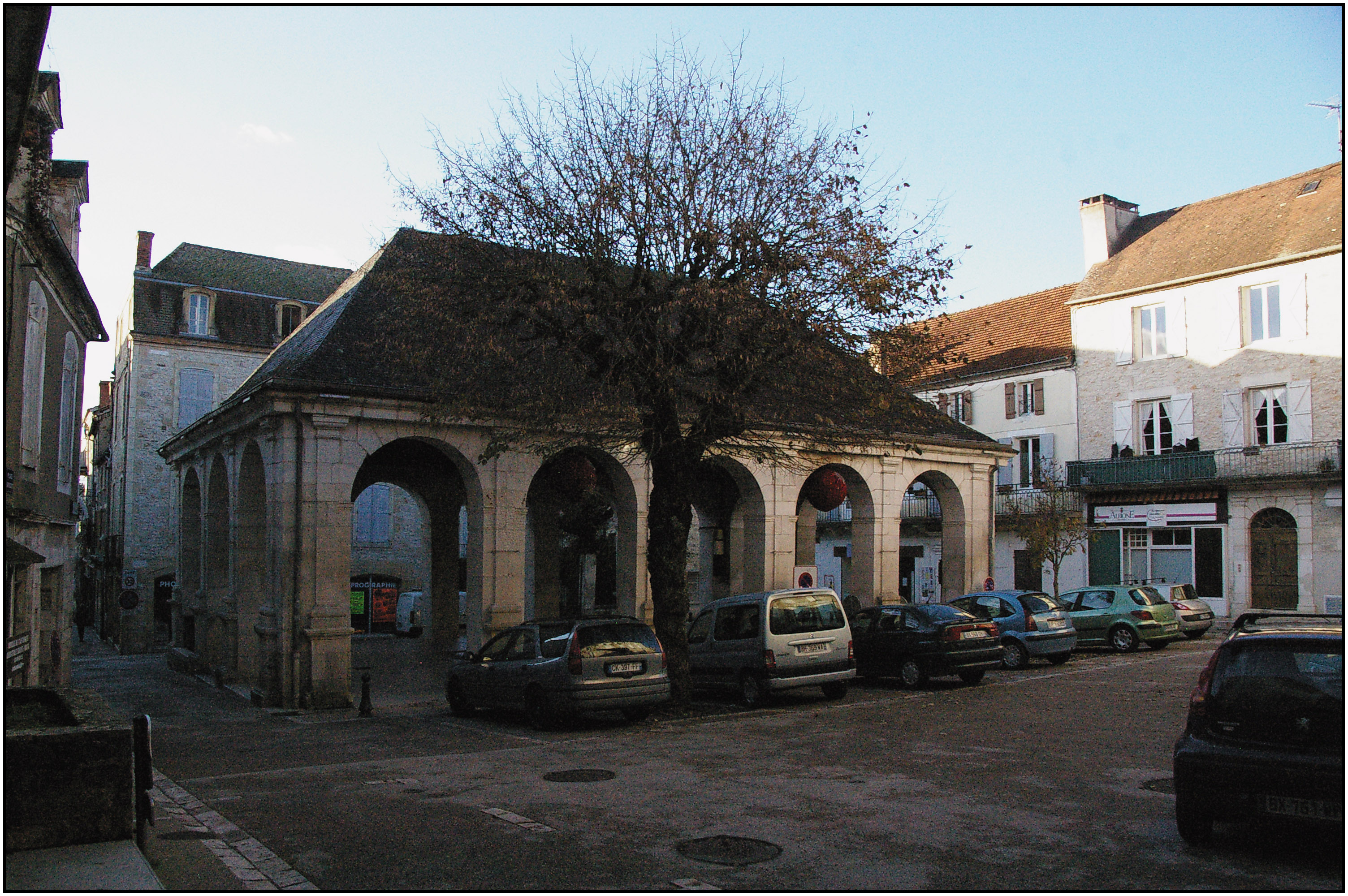 Halle de Souillac